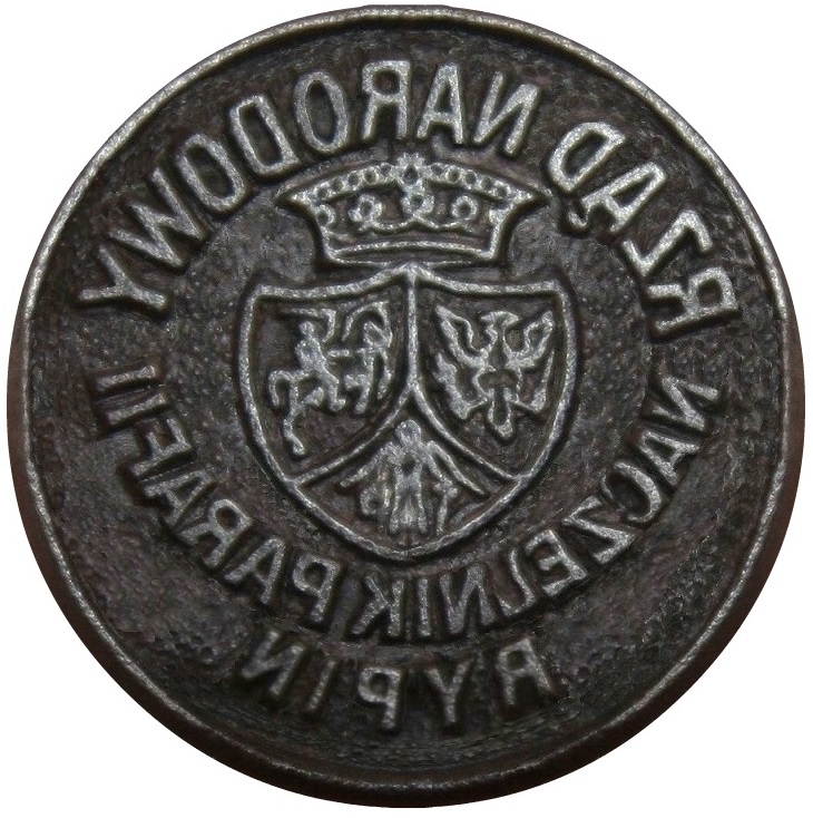 Zdjęcie tłoku pieczęci naczelnika powstania na terenie parafii Rypin, Antoniego Janowicza z 1863 r. (ze zbioru śp. Antoniego Janowicza). Parafia Rypin to właściwość miejscowa władzy powstańczej.